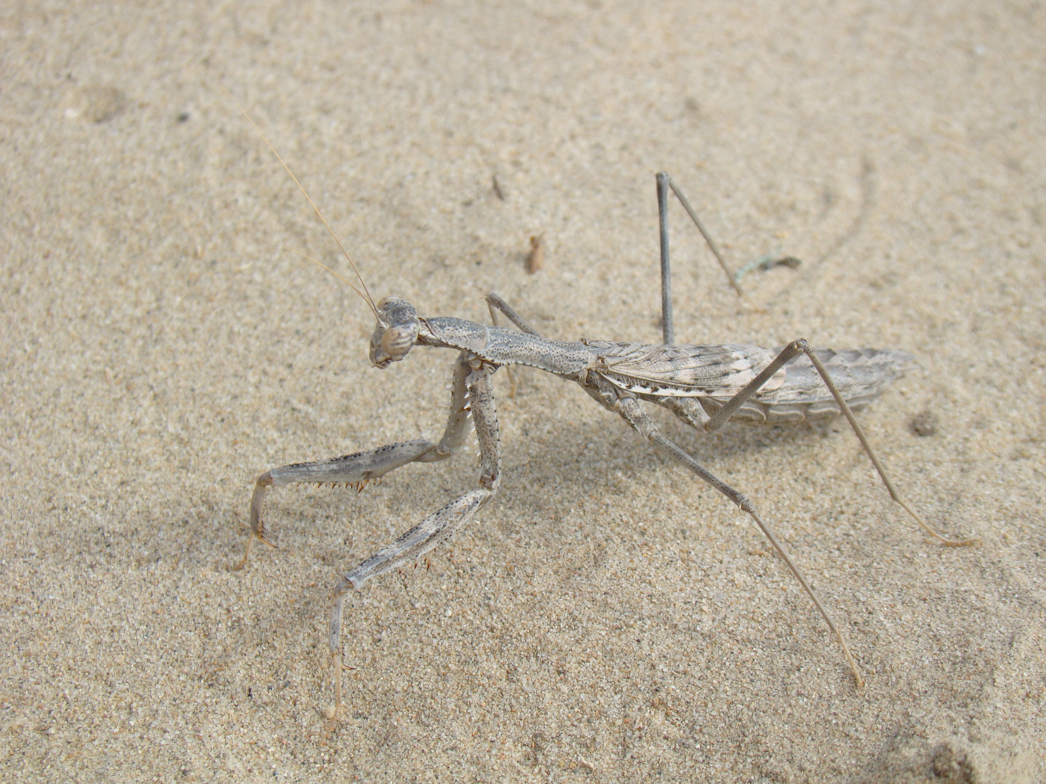 Боливария короткокрылая (Bolivaria brachyptera). Окрестости города Байконур, Кызылординская область, Казахстан